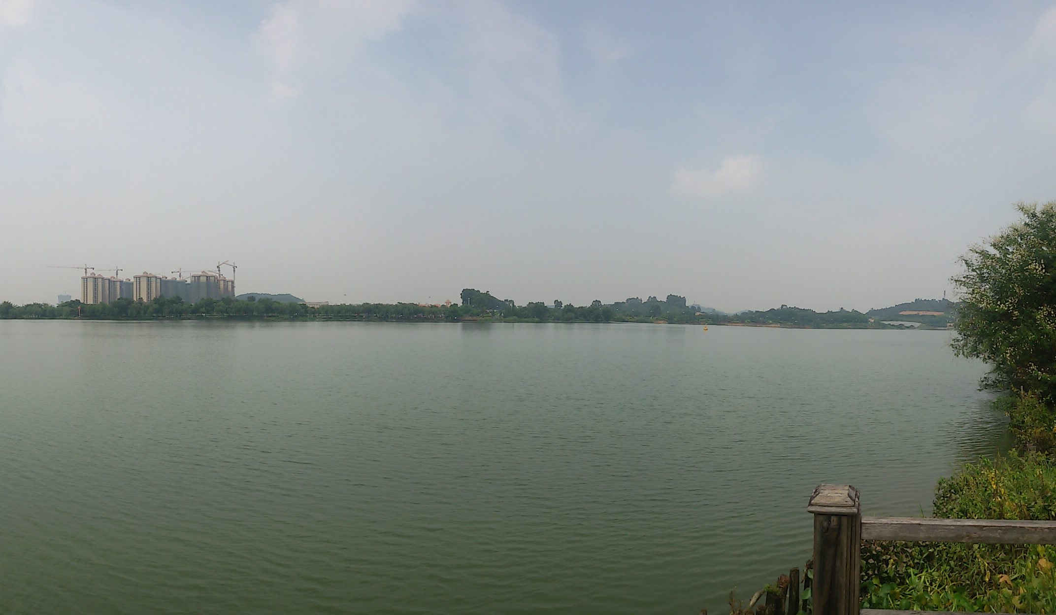 粵語: 喺增城鶴之洲望過去增江嗰邊